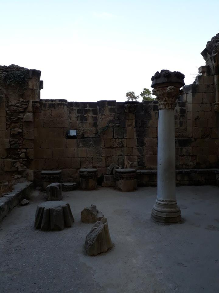 Colonne byzantine placée dans la cour de l'abbaye de Bellapais, Chypre.